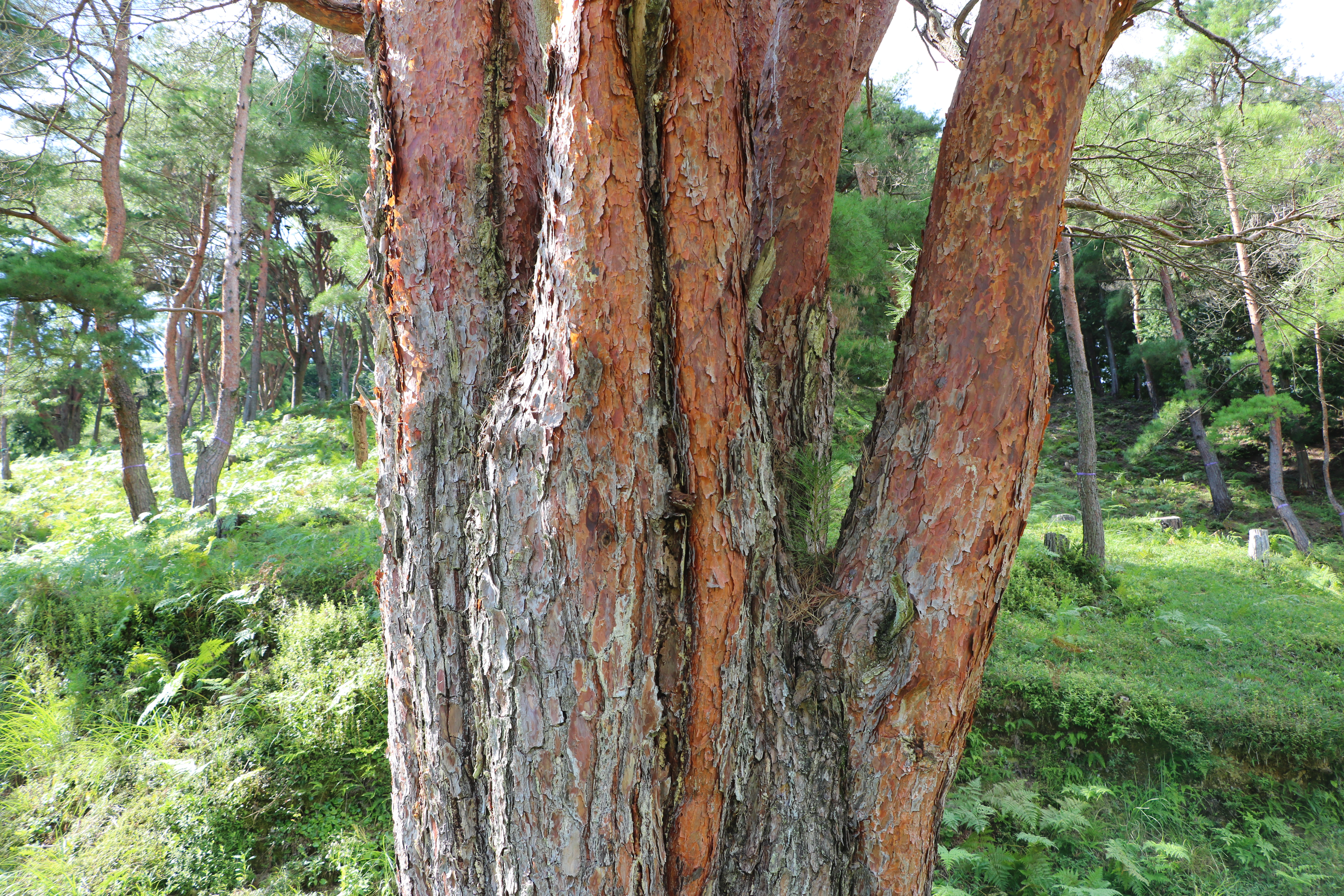 平松のウツクシマツ自生地（国指定天然記念物、滋賀県湖南市）